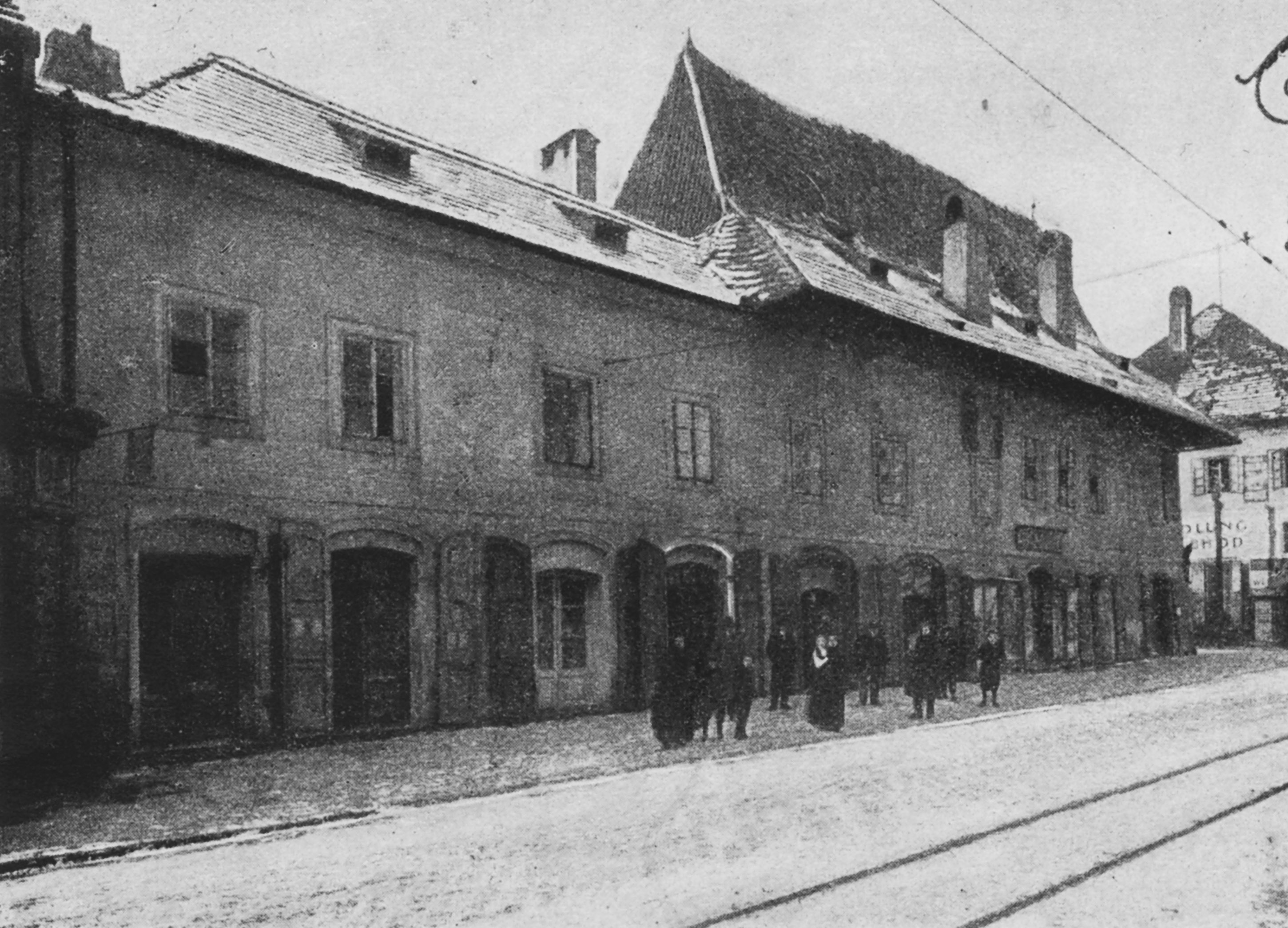 Album starých Budějovic. Barvířský dům v ulici Karla IV. (orig. text: Barvířský dům ve Vídeňské ul. Sbořen roku 1915.)